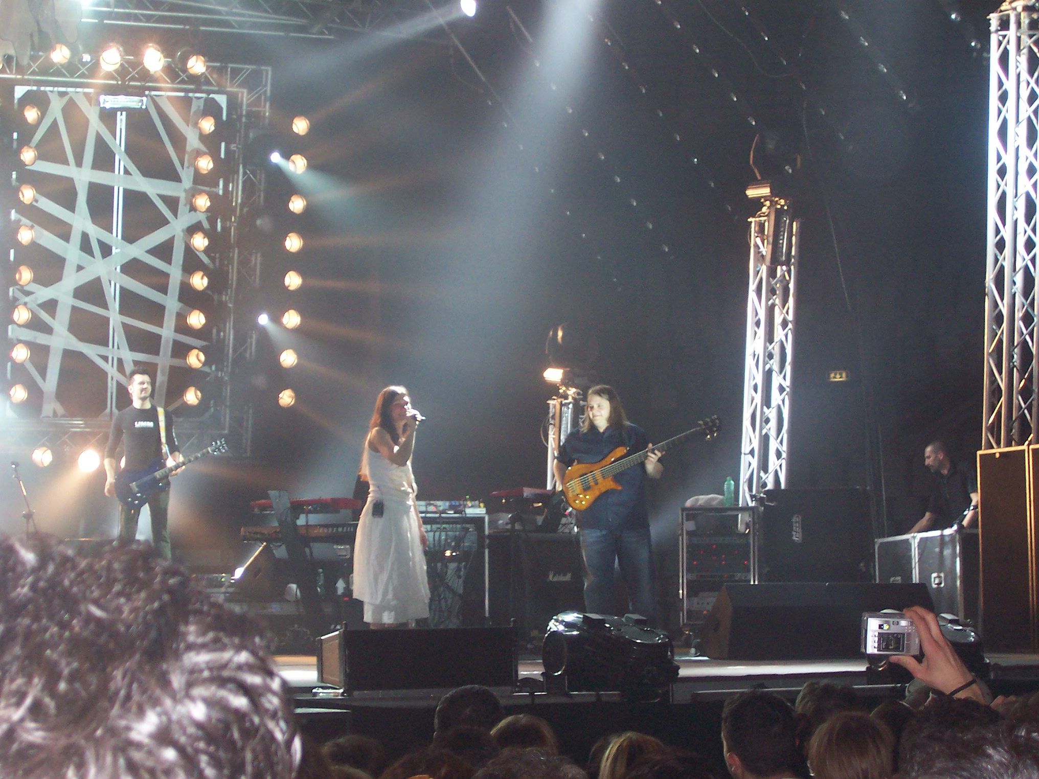 Foto di Elisa nella data romana del Pearl Days Tour (2005)